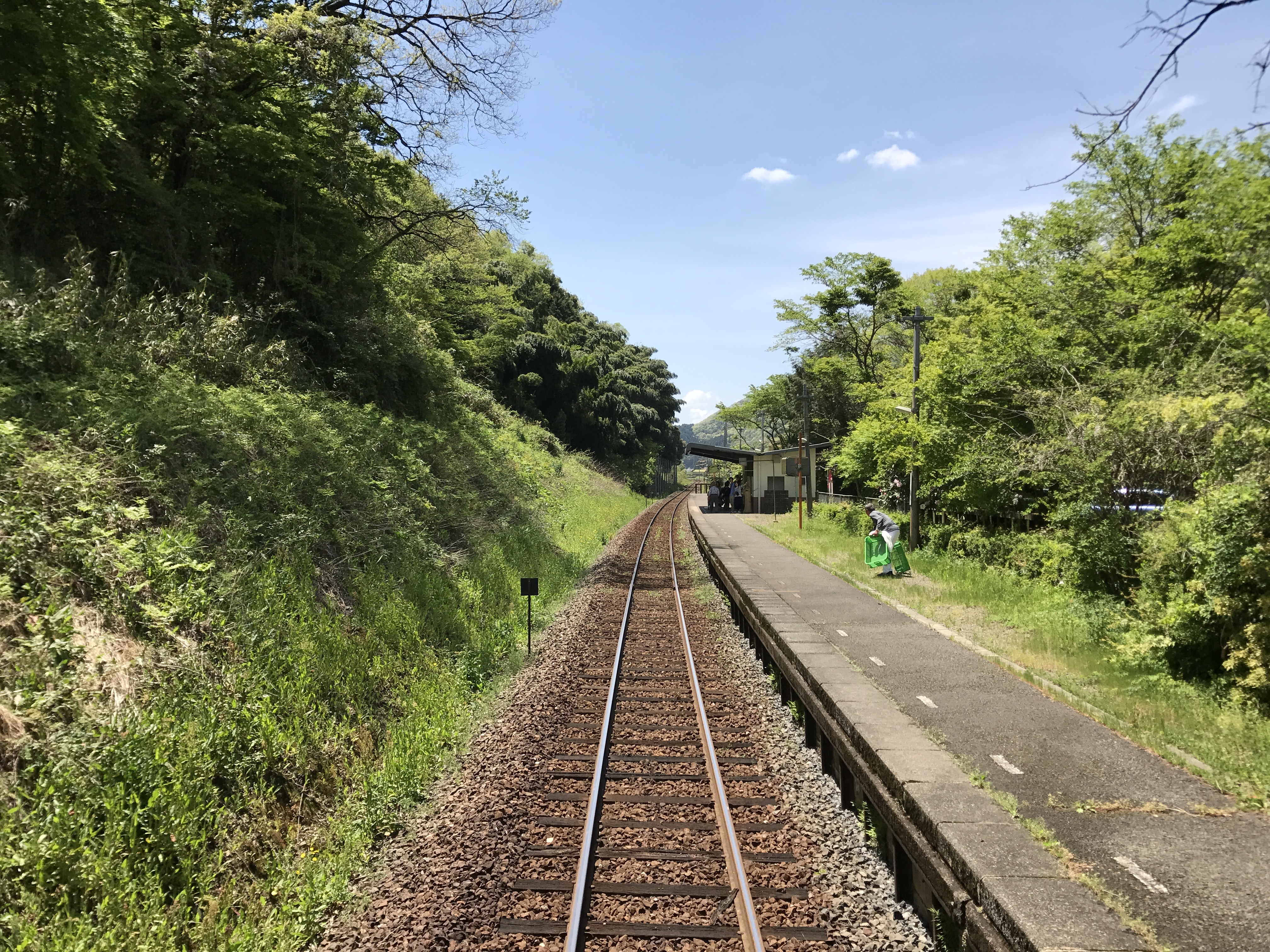 「SLやまぐち号」の展望デッキより望む長門峡駅のホーム